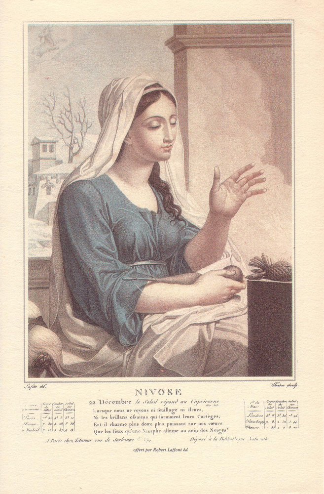 French Revolutionary Calendar NIVÔSE 22 Décembre: Le Soleil répond au Capricorne Lorsque nous ne voyons ni feuillage ni fleurs, Ni les brillans essaims qui fourmoient leurs Cortèges Est-il charme plus doux plus puissant sur nos coeurs Que les feux qu'une Nimphe allume au sein des Neiges !